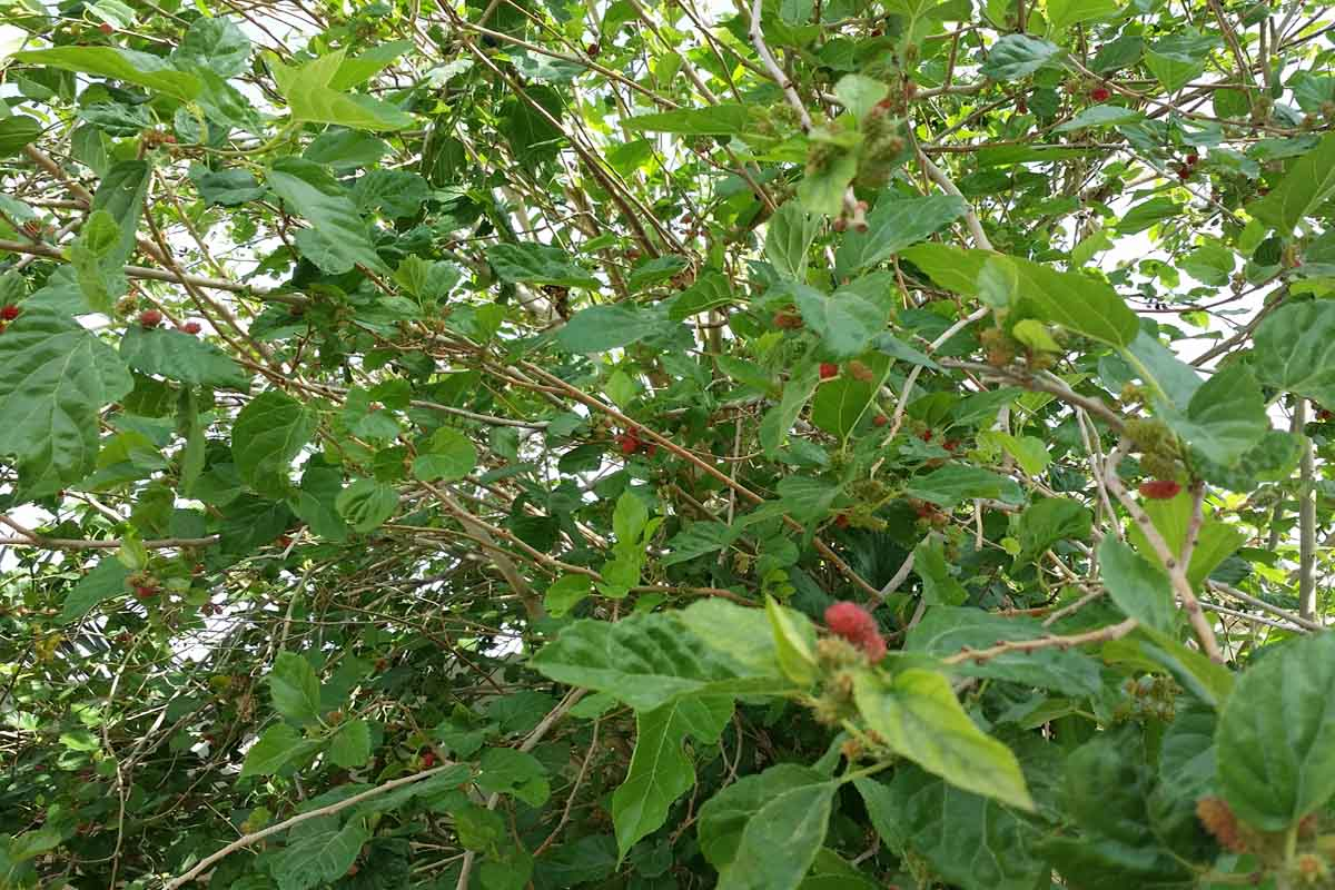 شجر التوت العماني